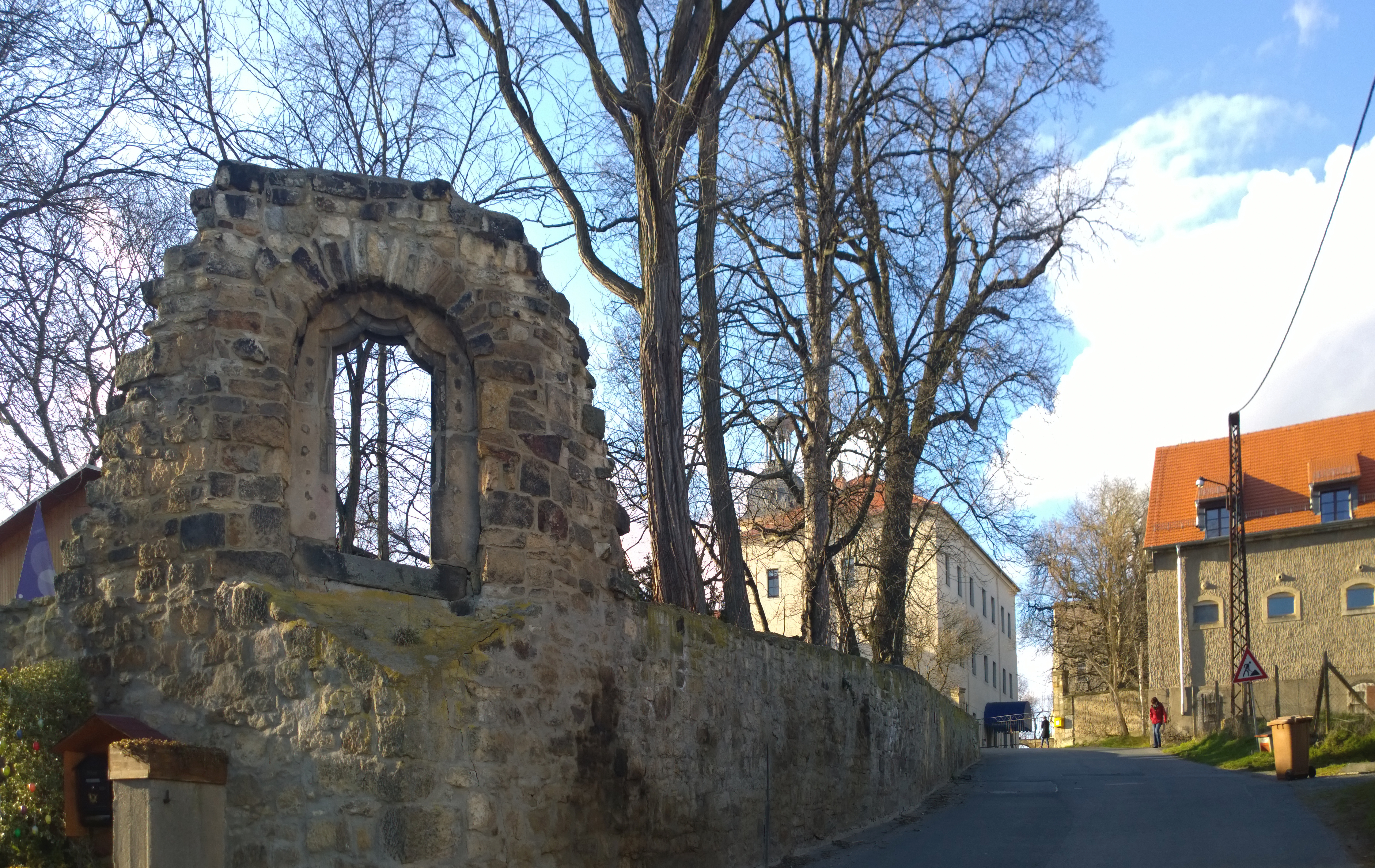 Schloss Röhrsdorf: Blick von Süden. Links Fensterrest der Schlossmauer (dahinter Freilichtbühne) mittig Schloss, rechts südliches Rittergutgebäude